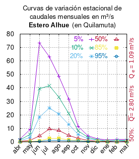 Curvas de variación estacional del estero Alhue en Quilamuta. # Dirección General de Aguas # Diagnóstico y clasificación de los cursos y cuerpos de agua según objetivos de calidad. Cuenca del río Rapel. # Santiago de Chile # Ministerio de Obras Públicas (Chile) # 2004 # url: # urlarchivo: # Tabla 4.12: Alhue en Quilamuta pág.69 mes 5% 10% 20% 50% 85% 95% abr 2.268 1.441 0.838 0.311 0.110 0.070 may 9.141 5.663 3.171 1.047 0.267 0.120 jun 73.307 39.366 18.537 4.395 0.746 0.263 jul 62.921 41.667 25.221 9.503 2.630 1.085 ago 48.605 33.130 20.771 8.384 2.562 1.157 sep 31.744 21.039 12.783 4.933 1.527 0.767 oct 11.287 8.262 5.661 2.749 1.129 0.670 nov 4.568 3.354 2.307 1.128 0.467 0.279 dic 2.059 1.501 1.023 0.492 0.200 0.118 ene 1.291 0.831 0.492 0.190 0.072 0.048 feb 1.808 1.059 0.555 0.166 0.043 0.023 mar 1.840 1.273 0.816 0.348 0.122 0.066 This plot was created with Gnuplot.